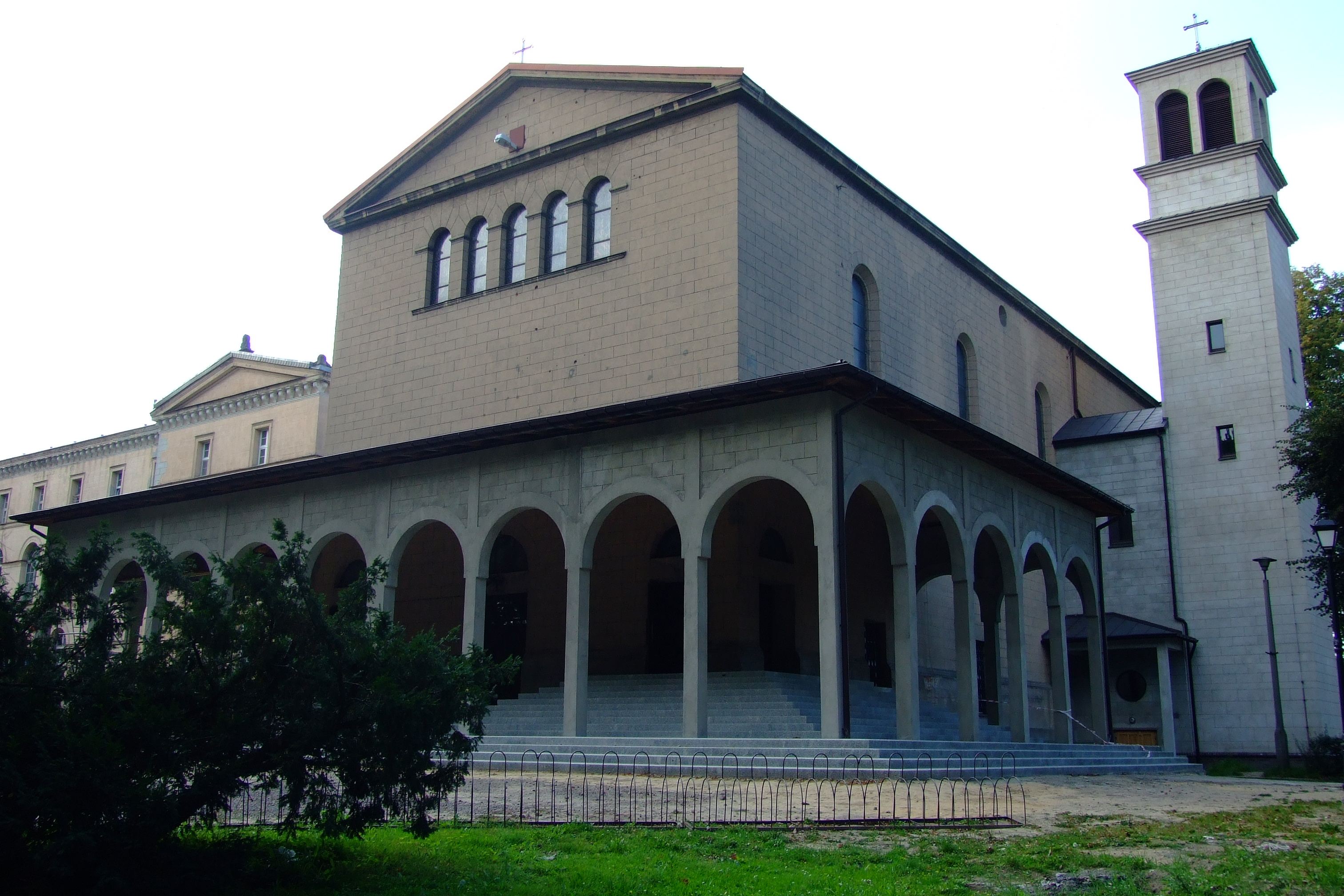 Kościół św. Stanisława Kostki w Lublińcu